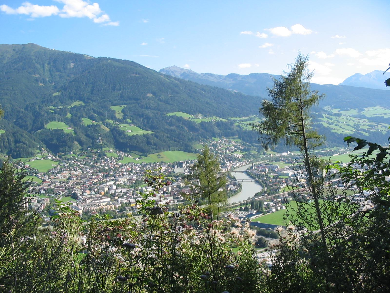 Schwaz, Tyrol